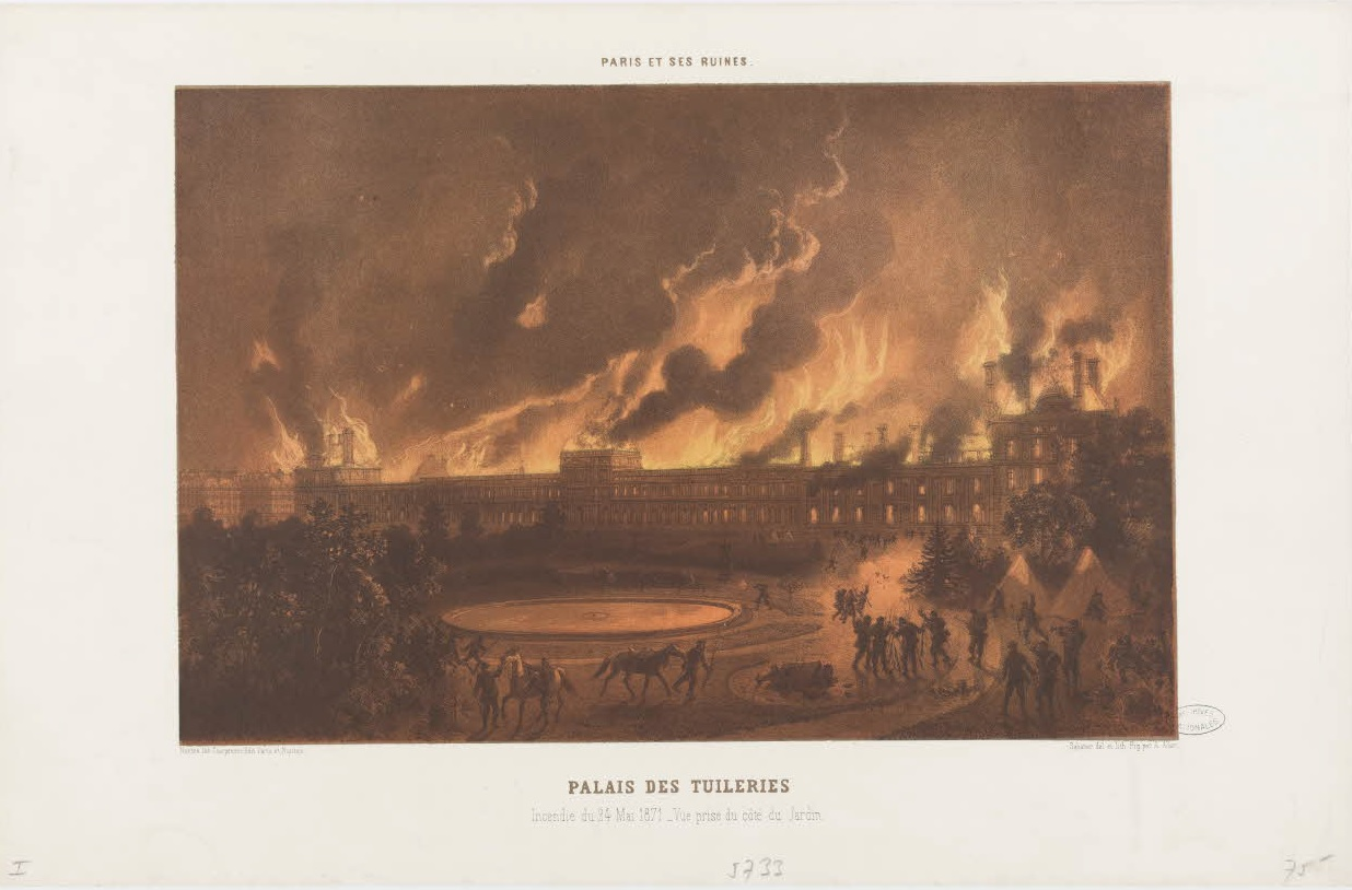 Gravure Paris et ses ruines. L'incendie des Tuileries